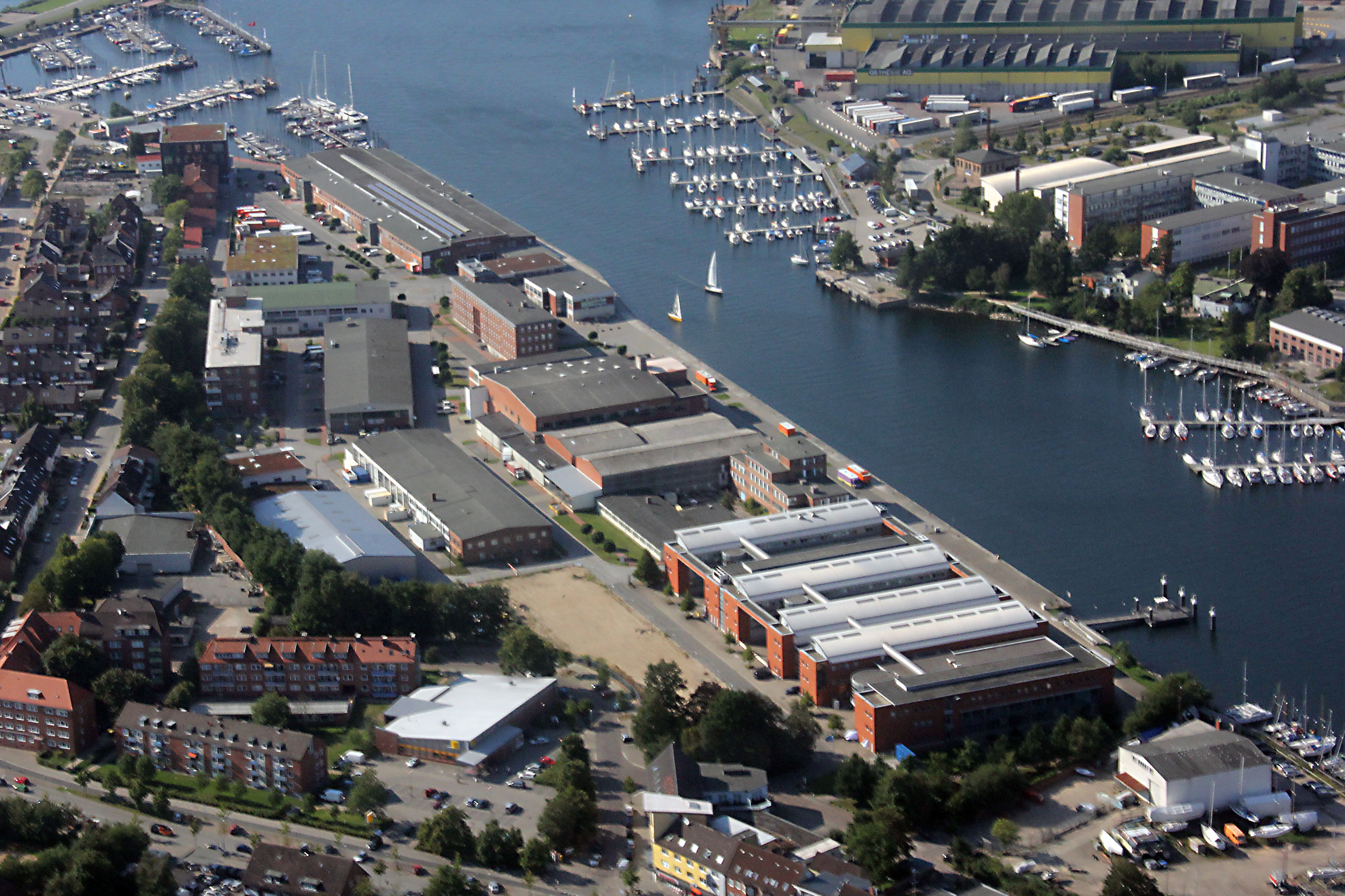 Luftbild des Standorts Ostufer des GEOMAR Helmholtz-Zentrums für Ozeanforschung Kiel.